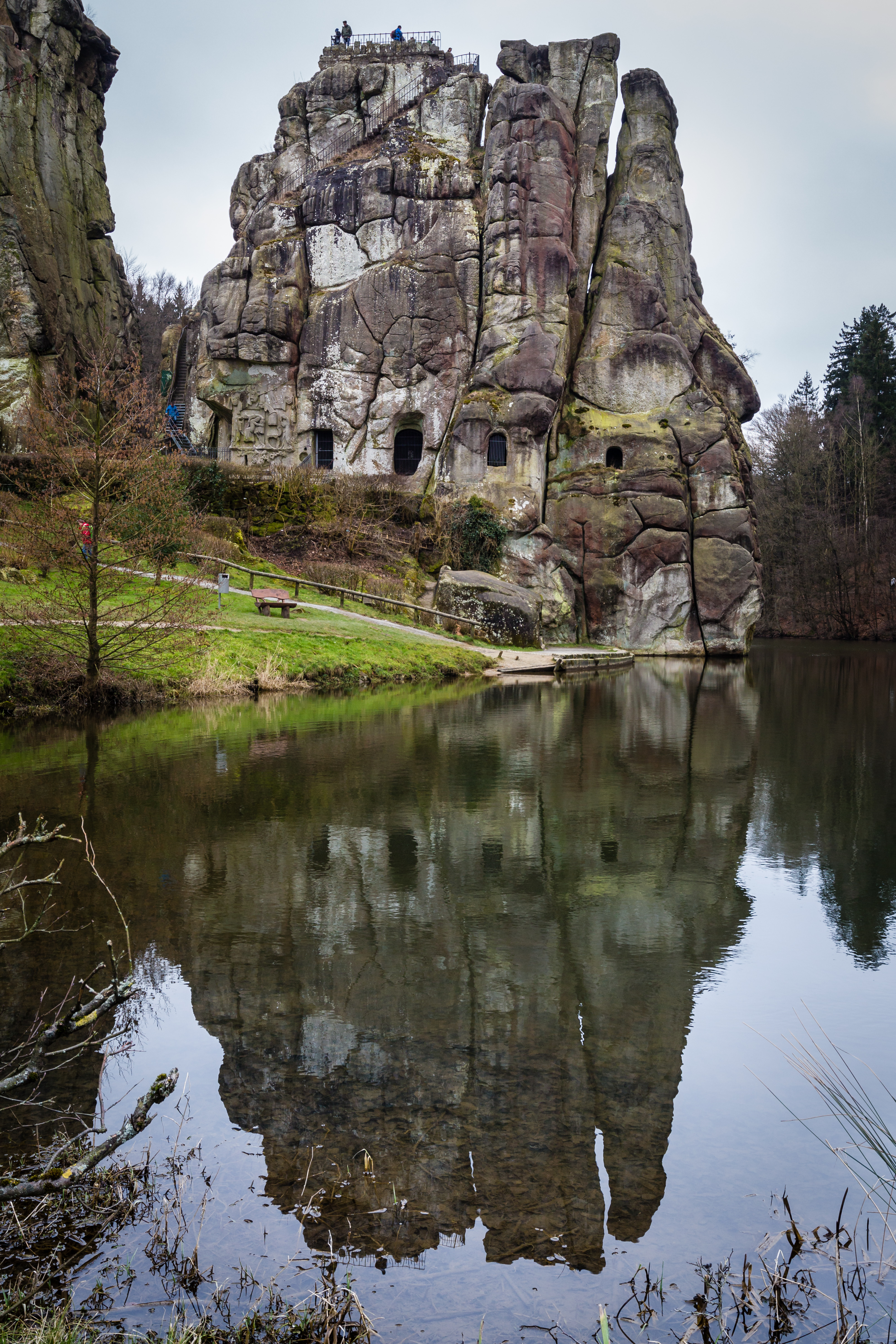 Externsteine und Wiembecketeich